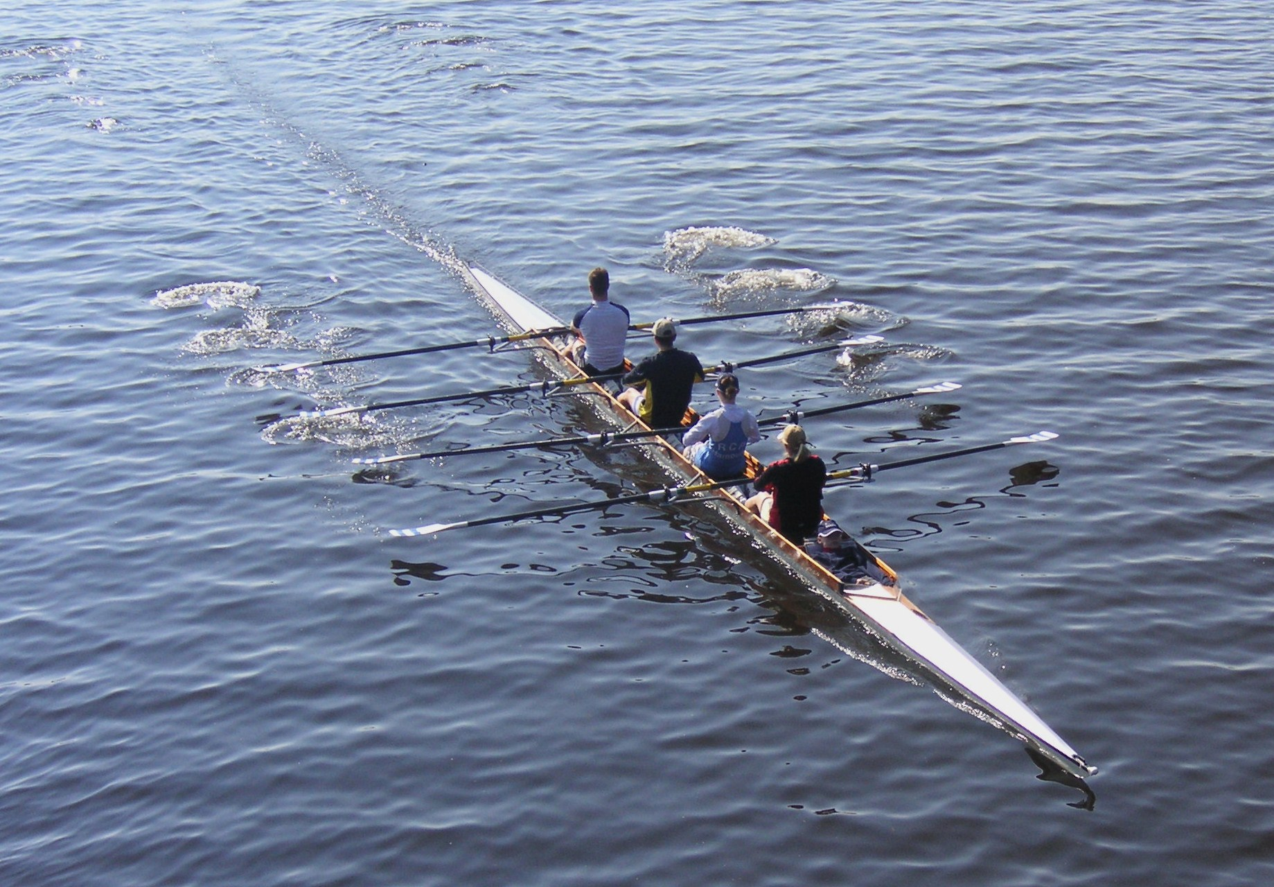 Gemischer Vierer mit Steuermann (liegend) auf der Alster in Hamburg